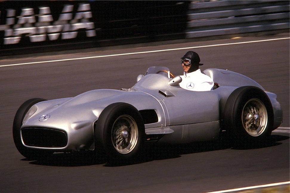 Bildbeschreibung: Mercedes-Benz W 196 mit 3-l-Motor (Fahrer: Juan Manuel Fangio) Quelle: Spurzem Fotograf: Lothar Spurzem Datum: 16.08.1986 auf dem Nürburgring Sonstiges: Die Auswölbung der Motorhaube deutet auf den 3-l-Motor hin.